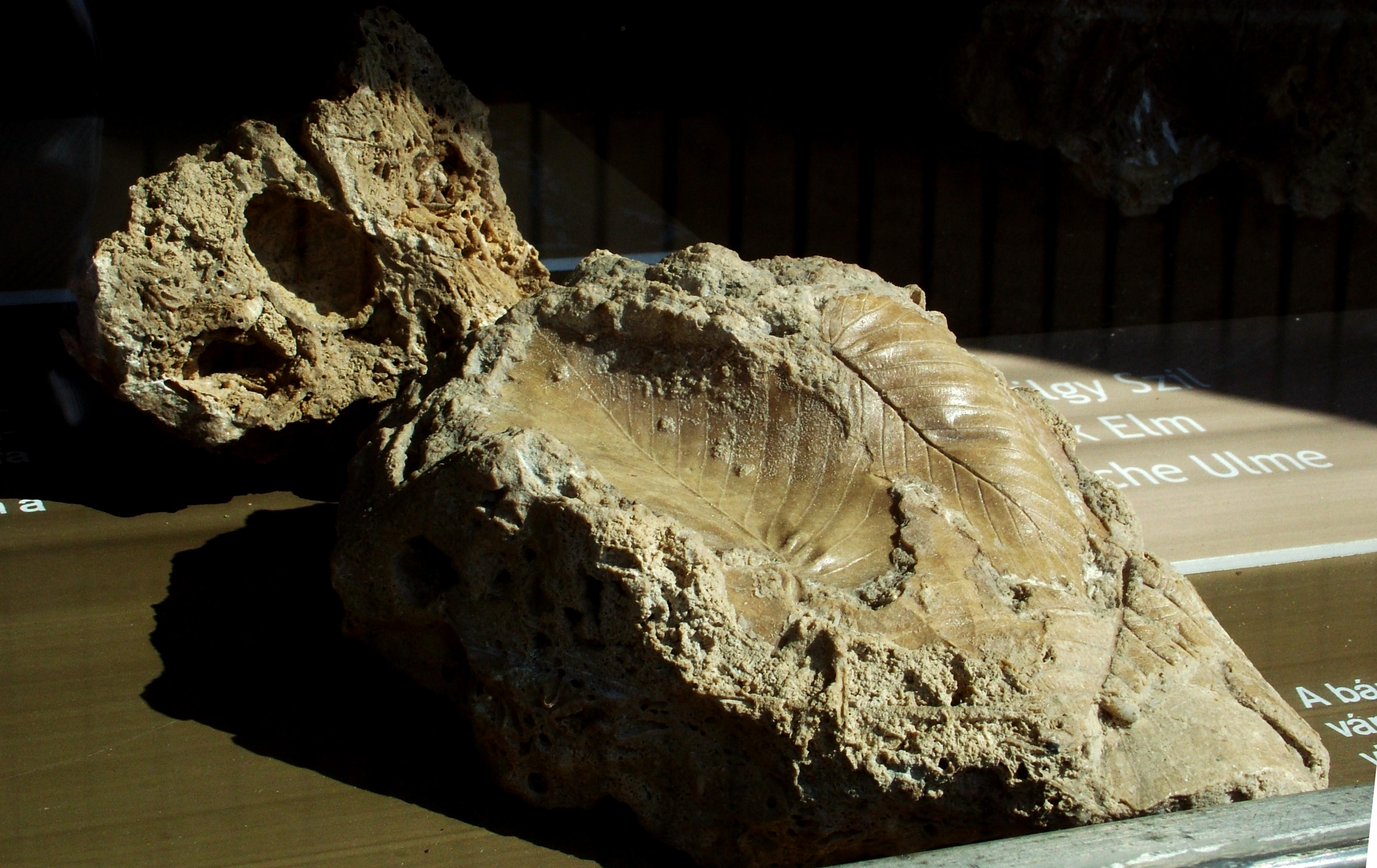 Megkövült falevél (Vértesszőlős Őstelep)